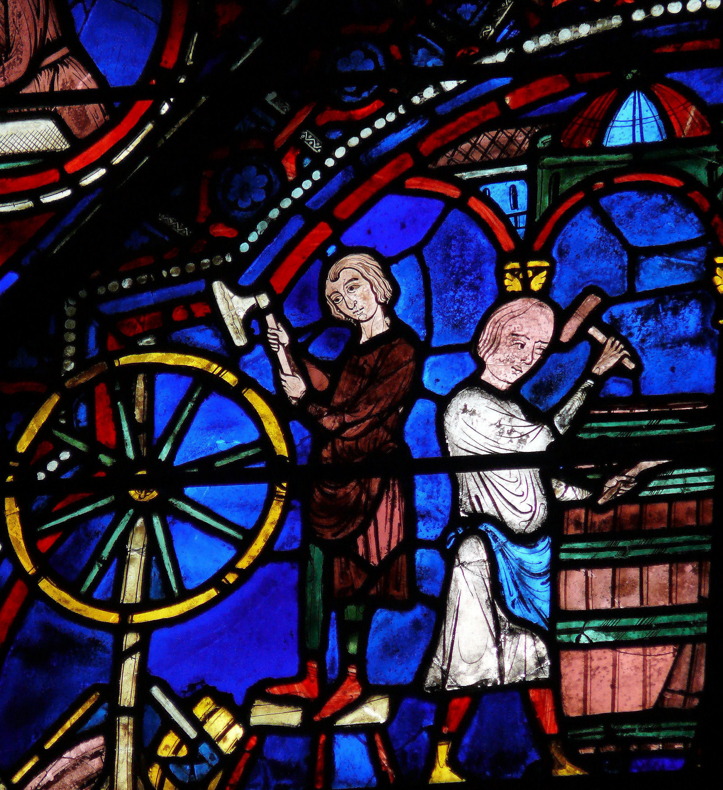 Cathédrale de Chartres - Vitrail du bas-côté Nord - Charron et tonnelier